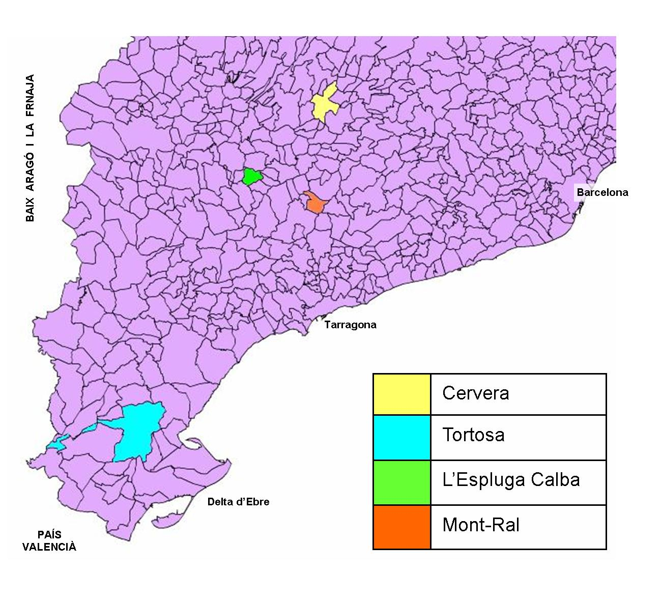 Mapa dels municipis del Principat de Catalunya amb quatre pobles acolorits que s'anomenen en l'article "Arnau Bosquet": Cervera, L'Espluga Calba, Mont-Ral i Tortosa. Municipalities map of Principat de Catalunya with four coloured villages related in the "Arnau Bosquet" explanation.